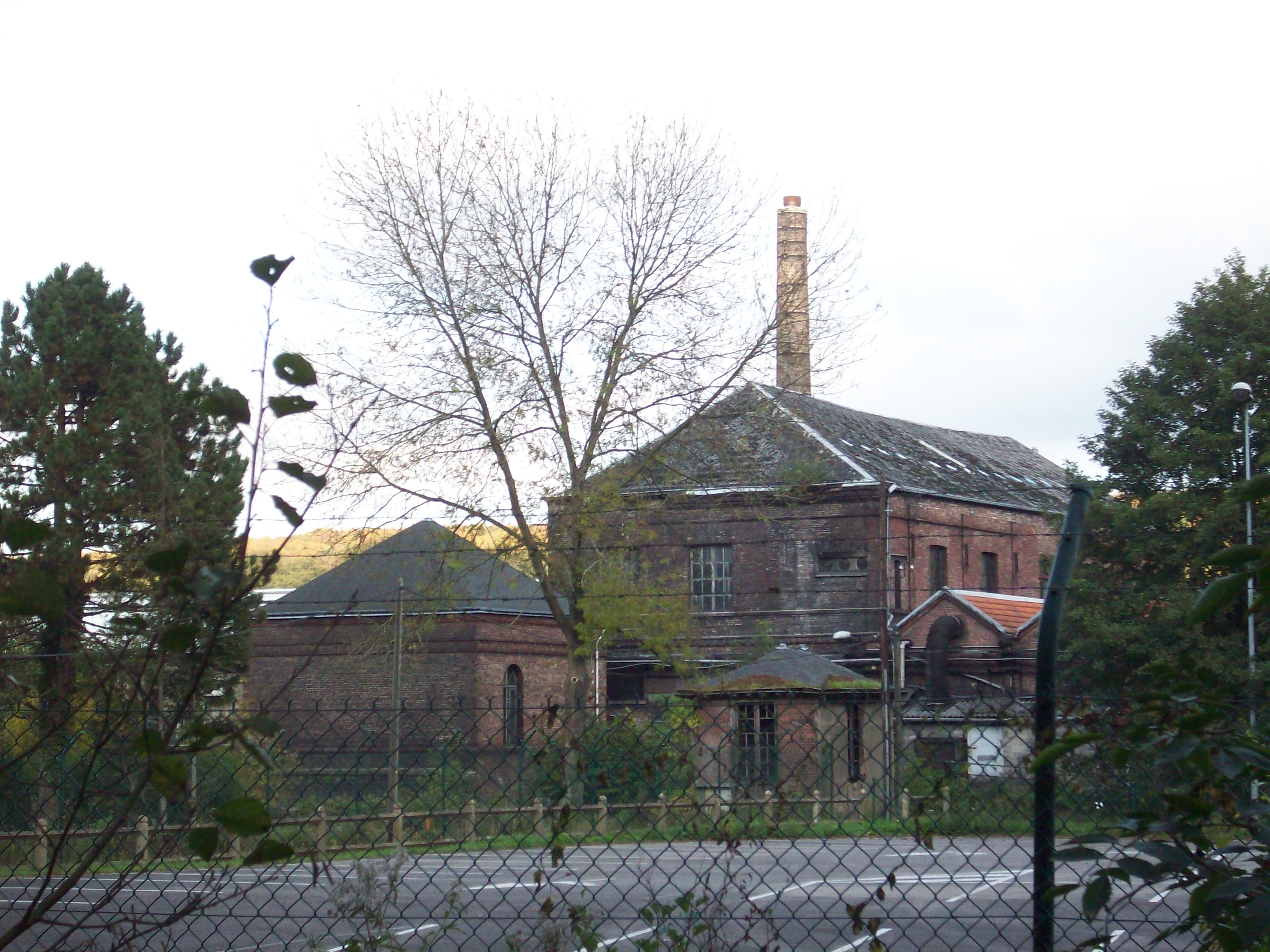 Usine de Transières: la partie la plus ancienne avec les bâtiments en brique et la cheminée.